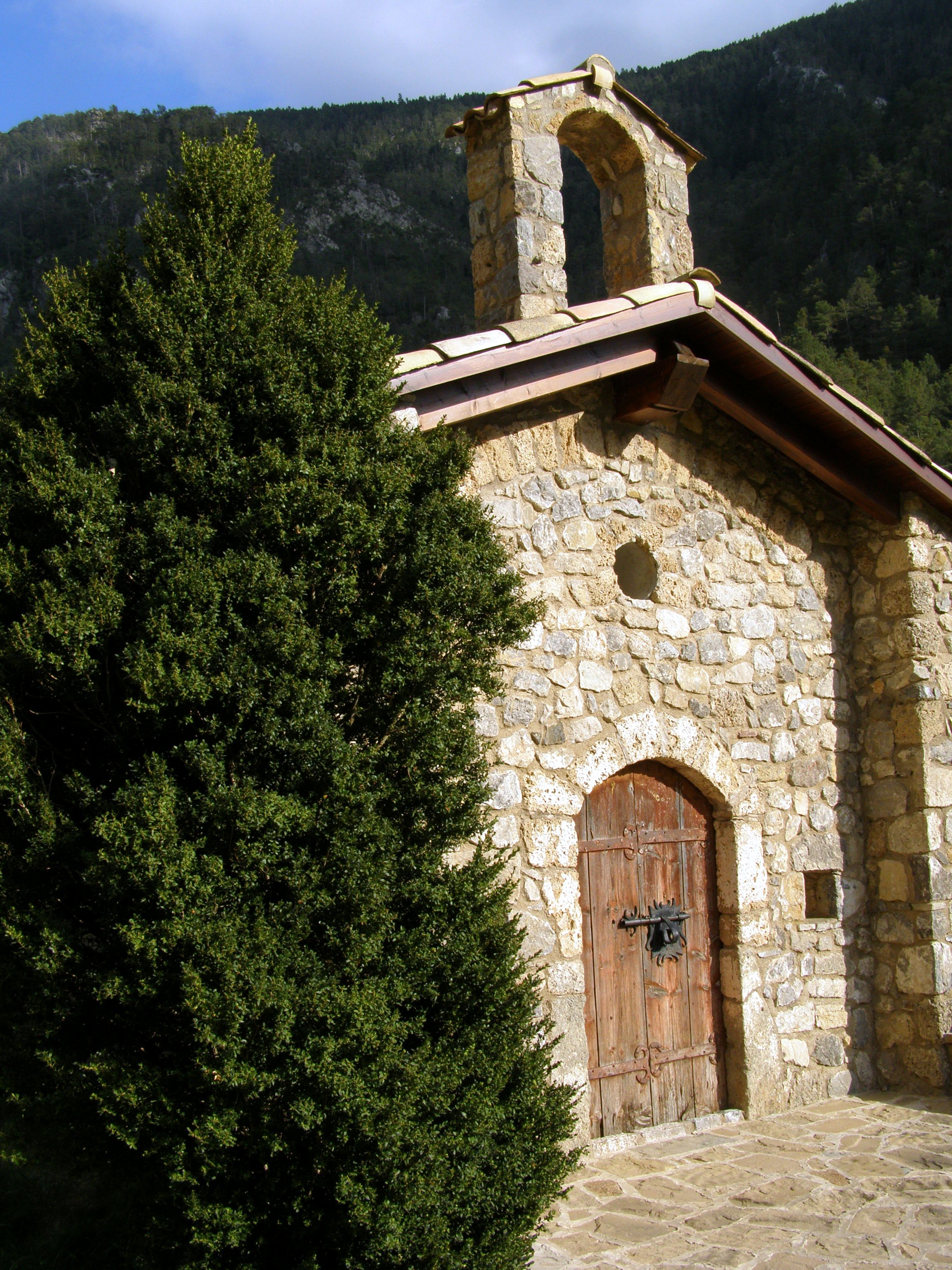 Ermita de Sant Jaume de Tuixent, a l'Alt Urgell (Catalunya).